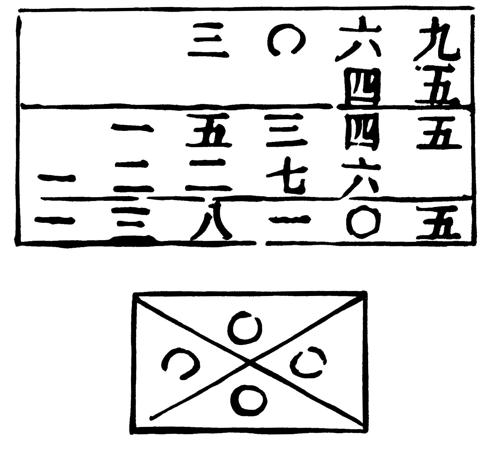 Li Yes Darstellung der Gleichung 2 x 3 + 15 x 2 + 166 x − 4460 = 0 {\displaystyle 2x^{3}+15x^{2}+166x-4460=0}